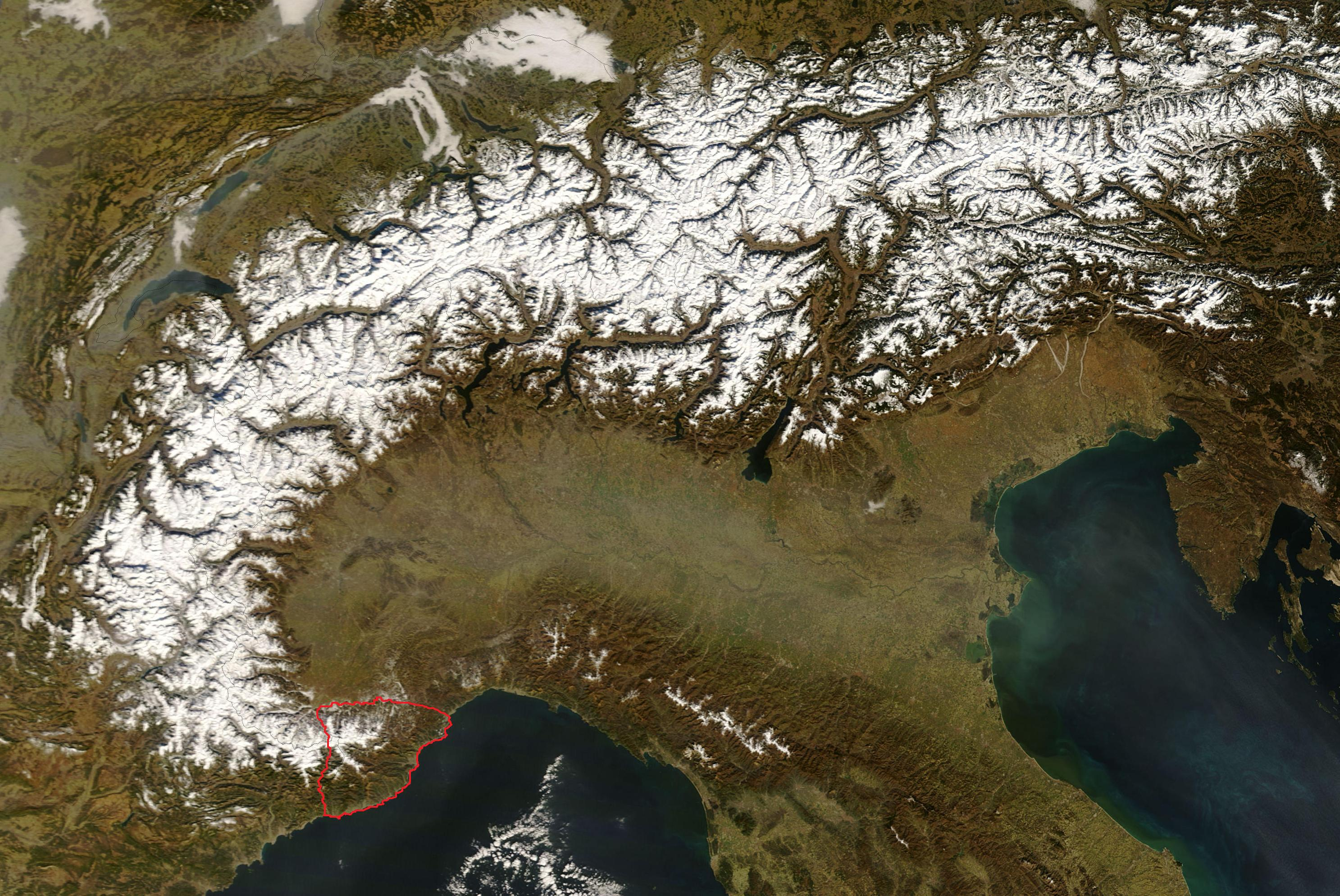 Talvinen satelliittikuva Alpeista, jota on käsitelty tietokoneella. Talvella luminen alue vastaa suunnilleen jääkaudella jään peitossa ollutta aluetta.